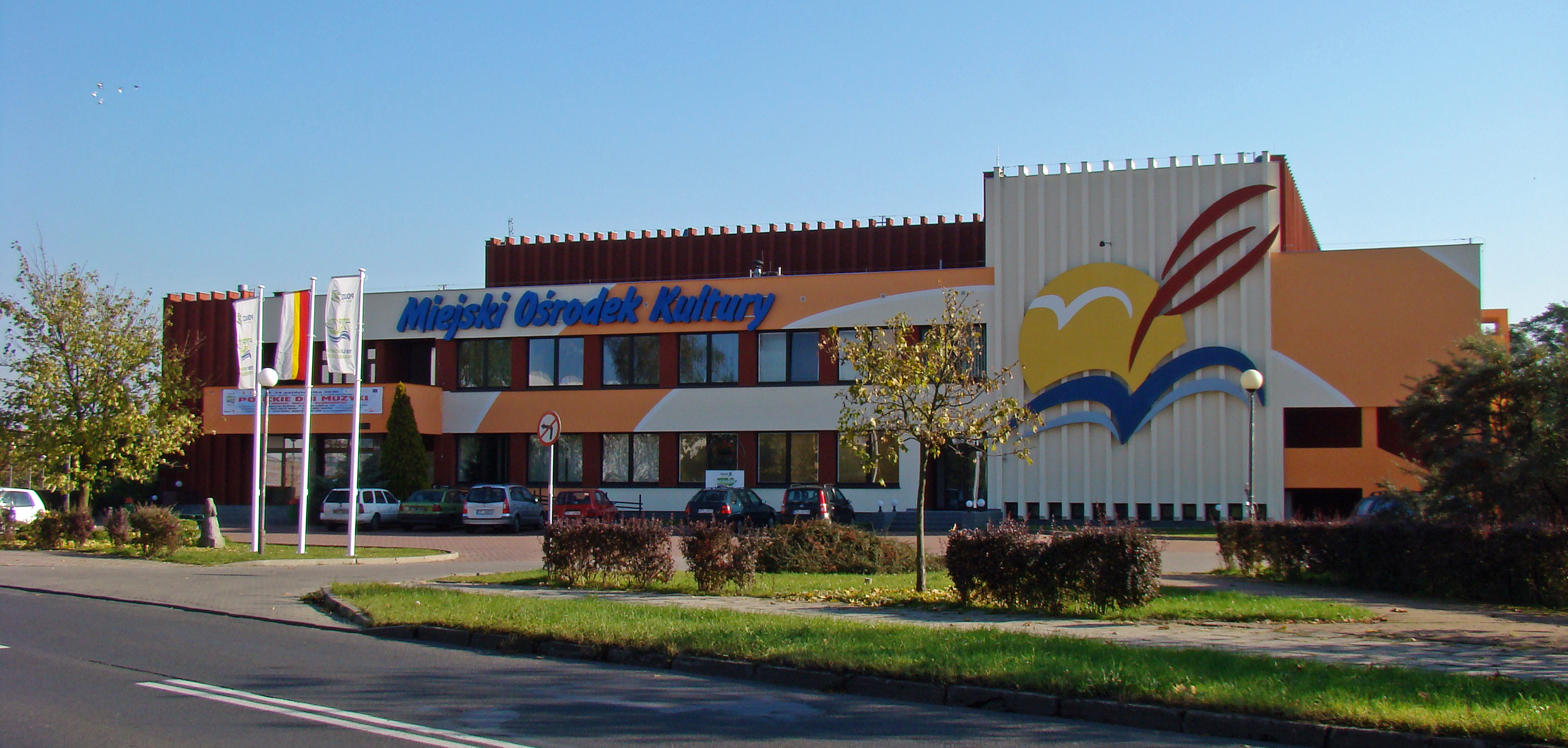 Miejski Ośrodek Kultury w Policach (Województwo zachodniopomorskie), Polska